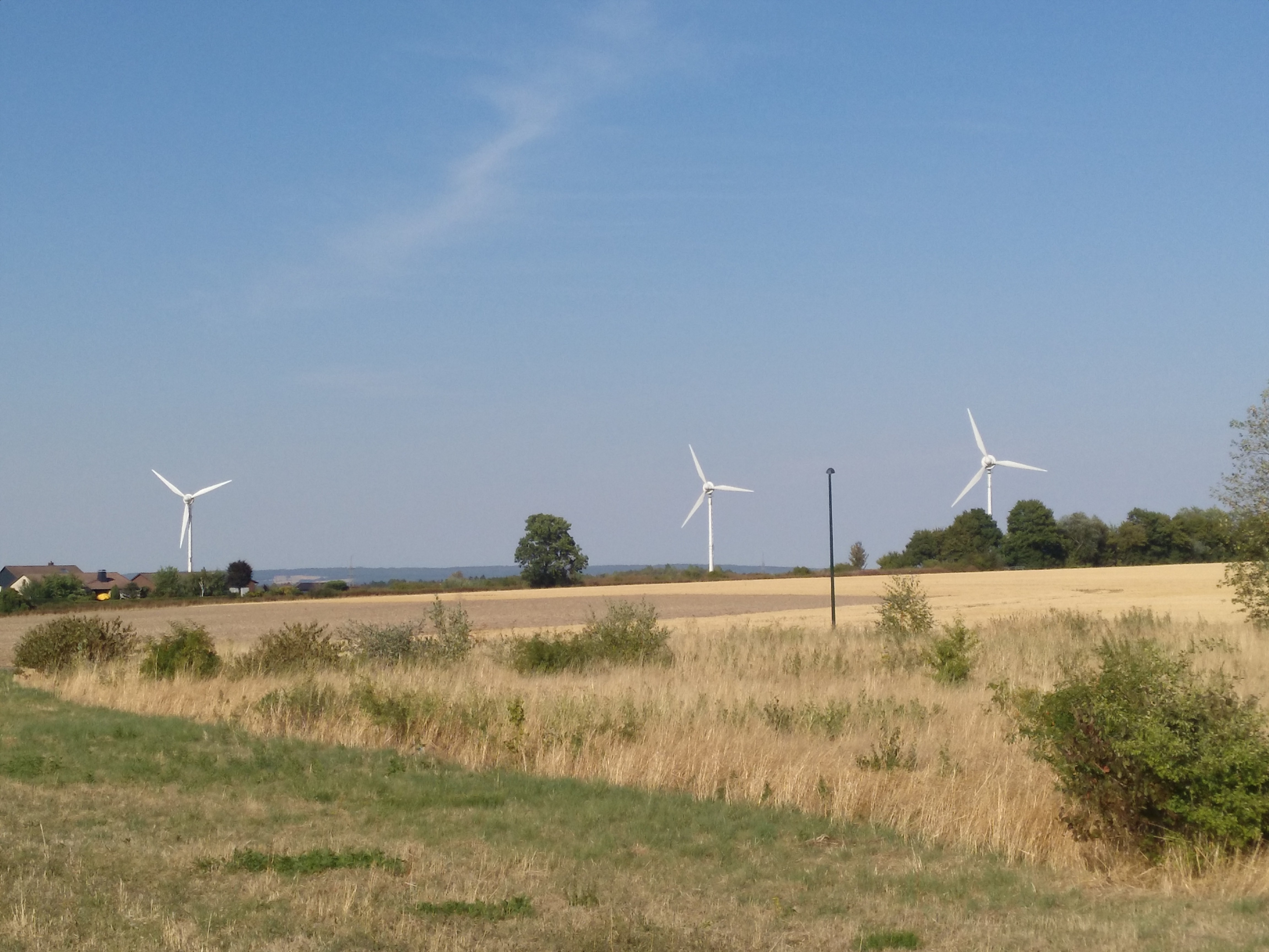 Der Windpark Schlewecke/Bad Harzburg vom Harlingeröder Bruch aus.